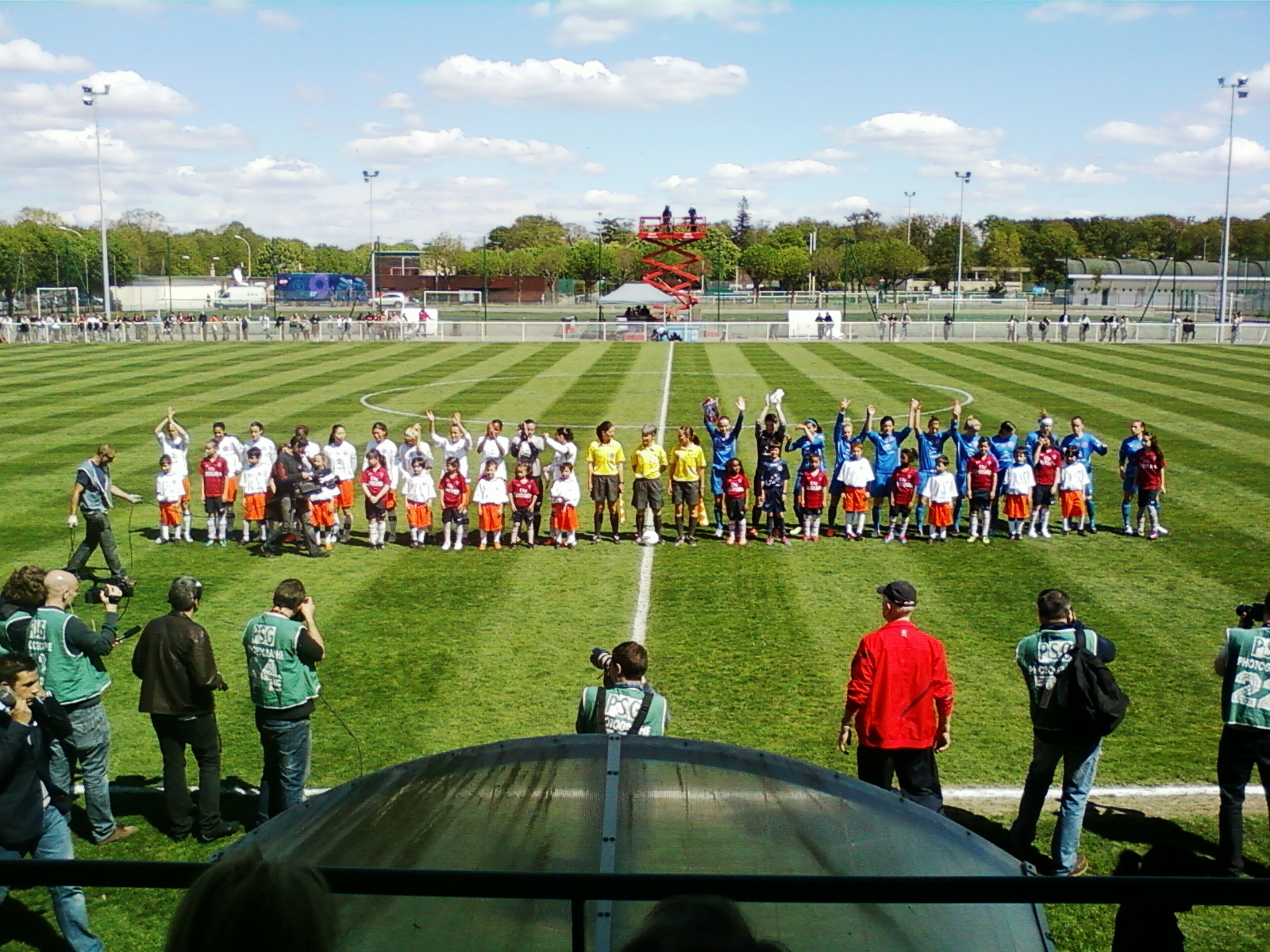 Présentation des équipes lors du match Paris SG - Montpellier du 1er mai 2012 en 1/2 finale de la Coupe de France.